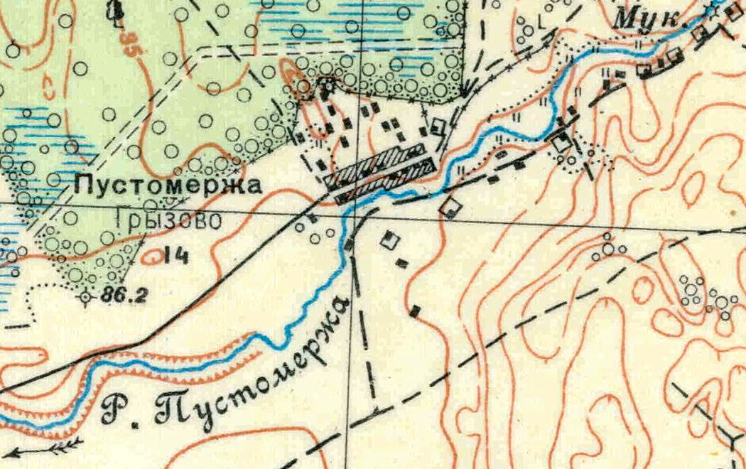 Топографическая карта Ленинградской области, квадрат О-35-22-Г-г (Торма), деревня Малая Пустомержа.